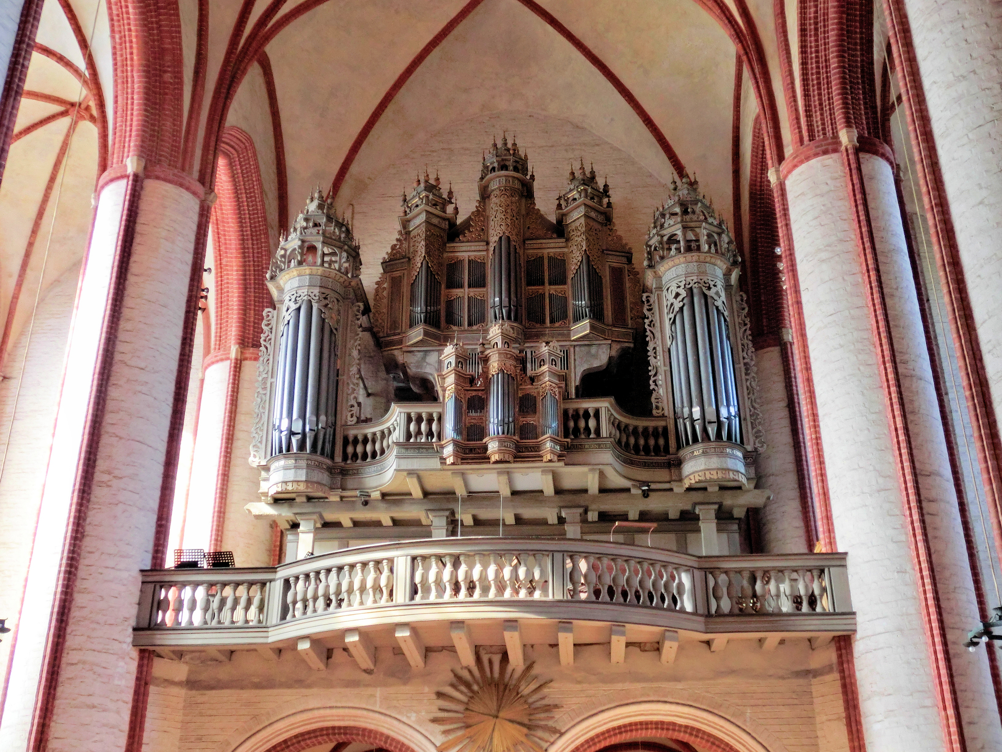 Orgel des Doms St. Nikolaus, Stendal